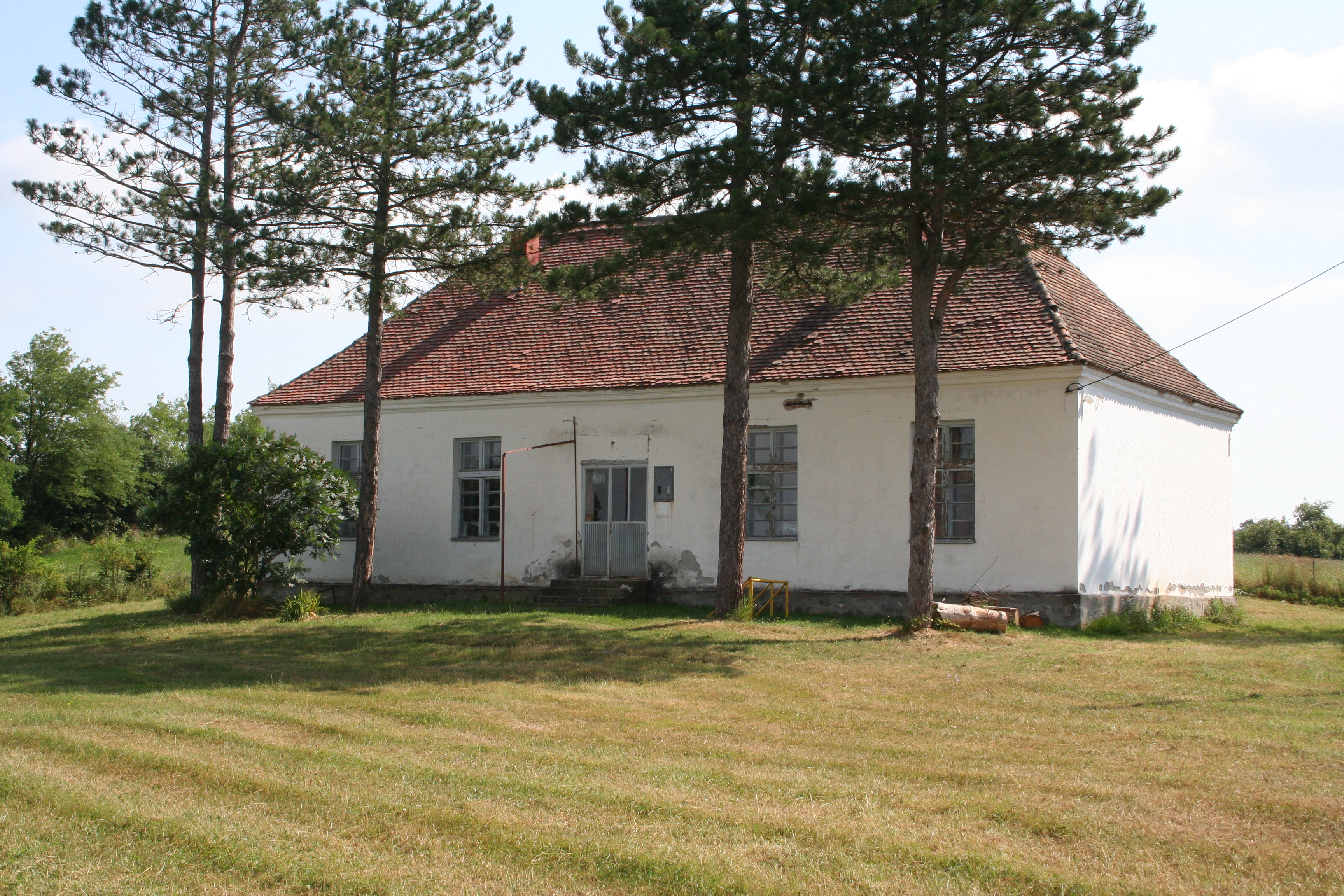 Seoska škola, Gradojević